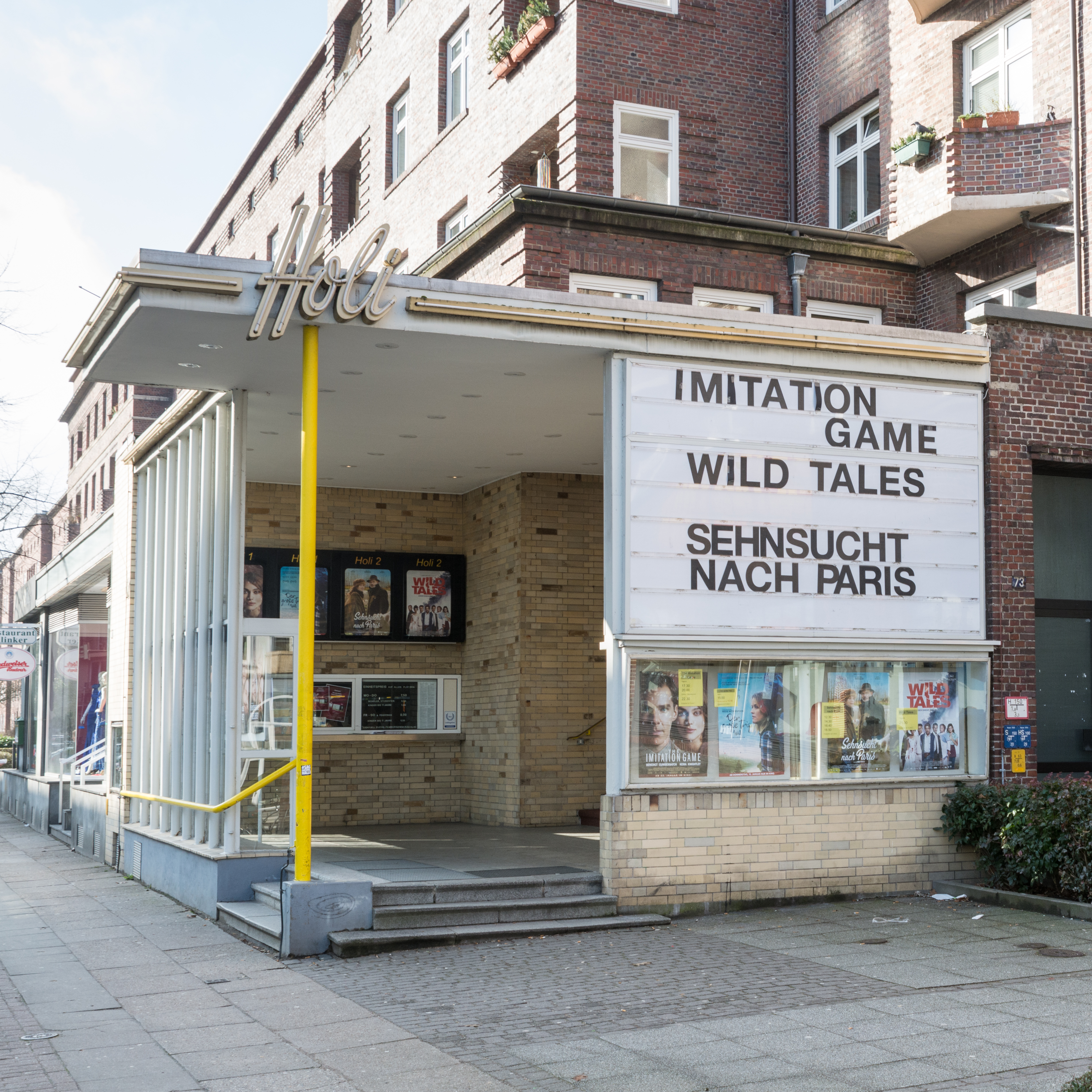 Siedlungsbau Klinker: Schlankreye 71 in Hamburg-Harvestehude mit Kino Holi. This is a photograph of an architectural monument.